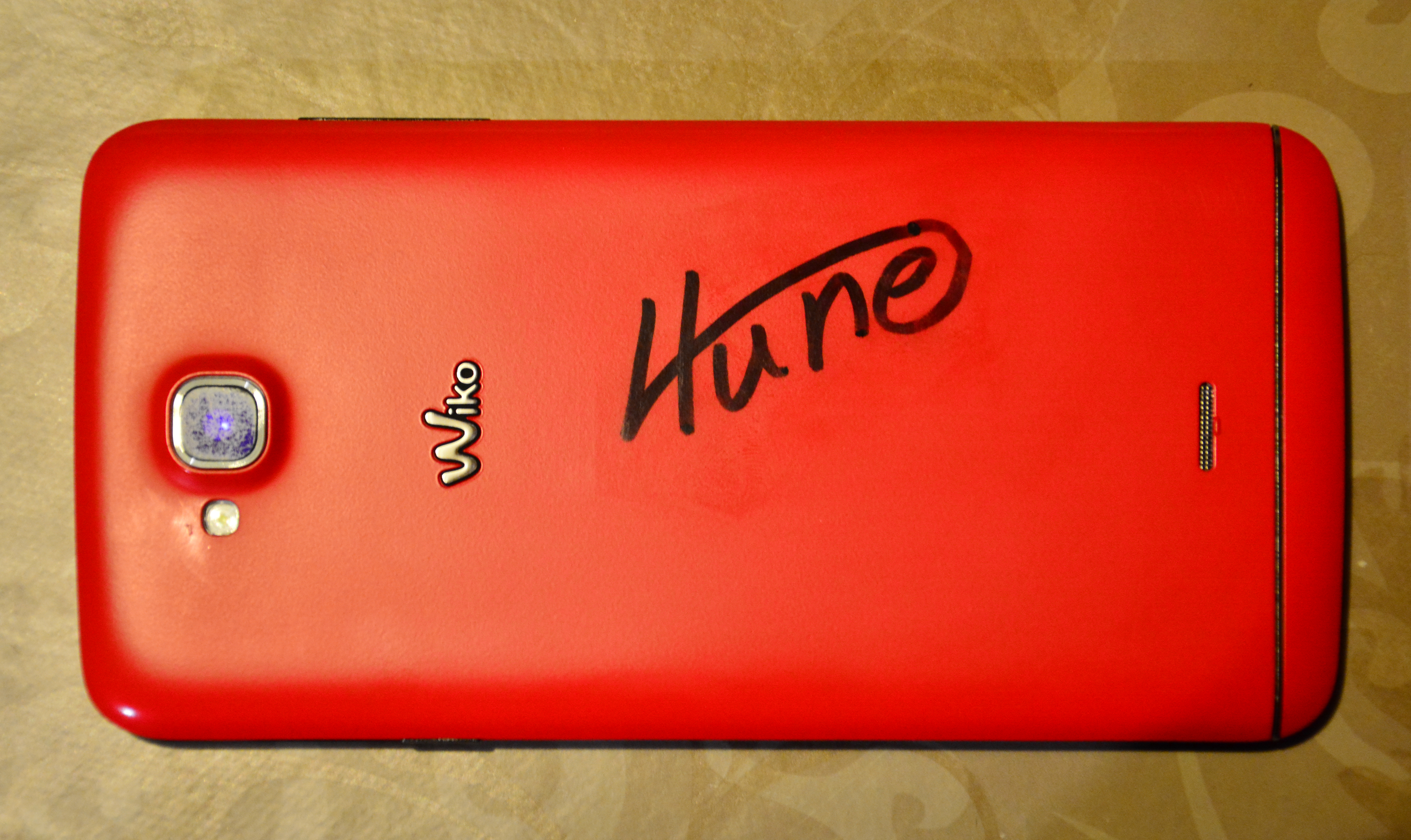 Wiko Slide mit Signatur des Rappers 4tune